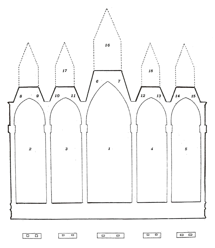 Schéma du polyptyque de Taddeo Gaddi (1354) en l'église de Santa Félicita à Florence